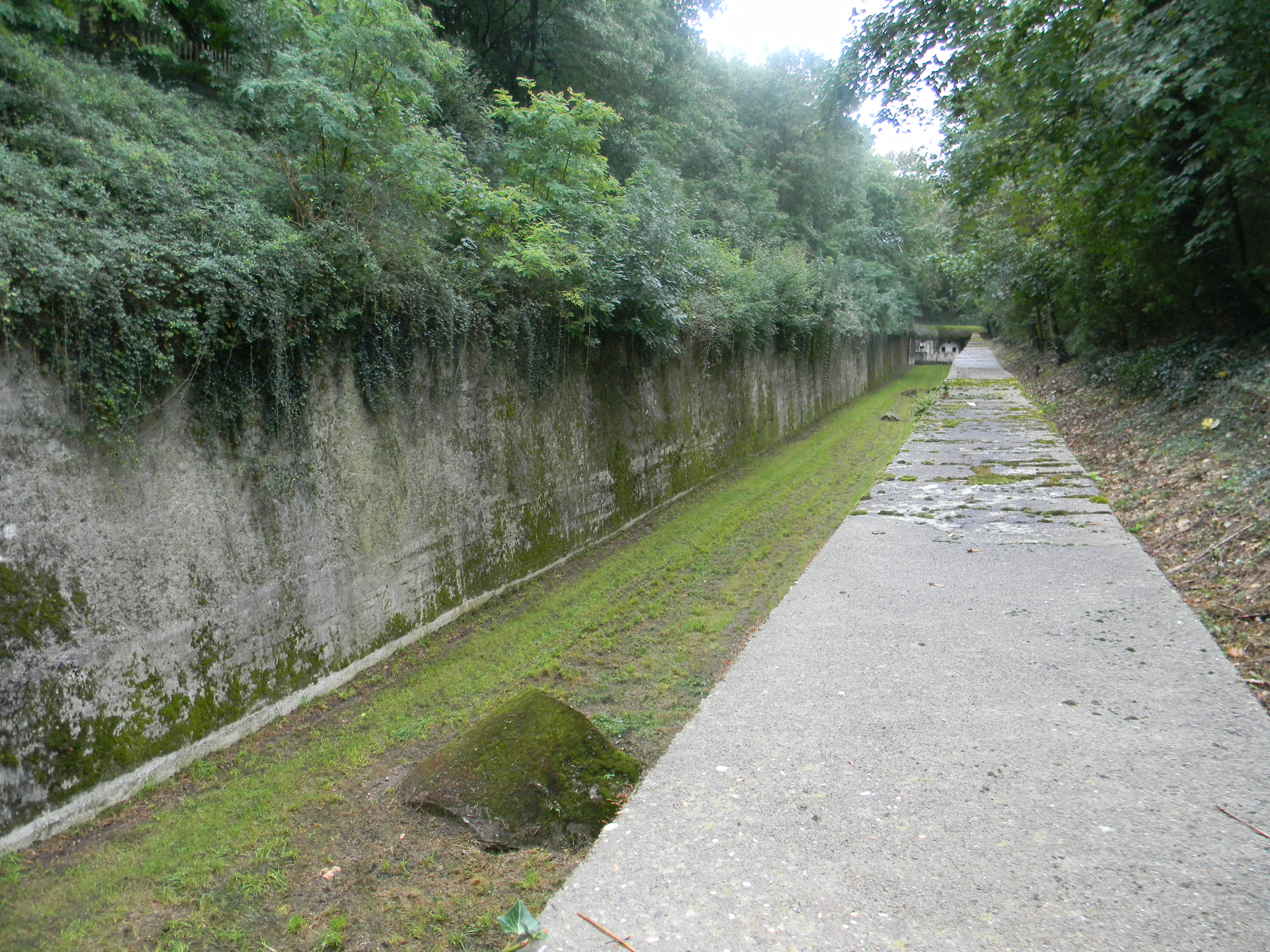 Fossé vu depuis le chemin de ronde du Fort de Saint-Priest. Les morceaux de béton visibles dans le fossé sont des débris d'un abris sous talus détruit par les Allemands lors de leur défaite.